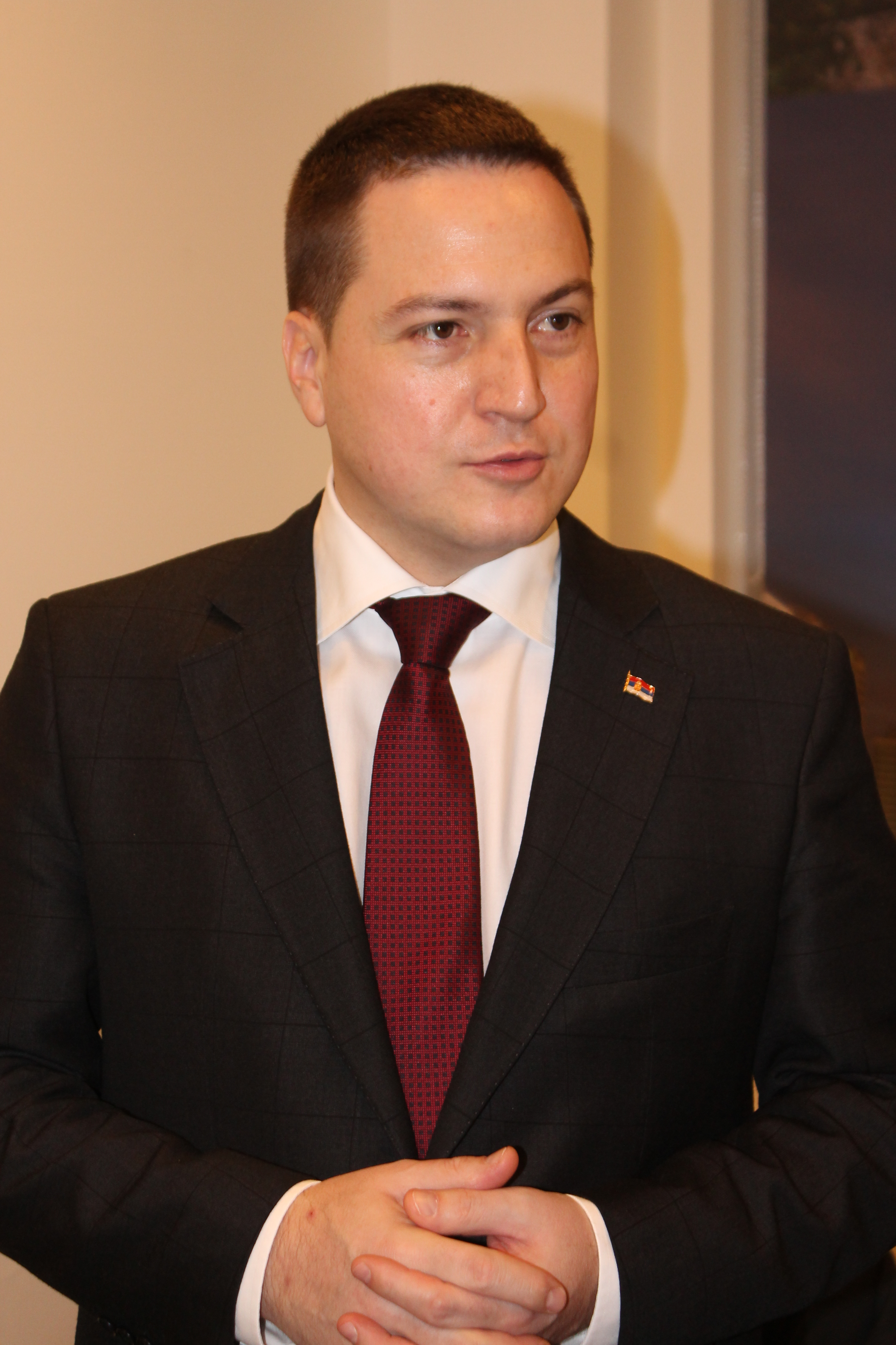 WikiGap 2018 in Belgrade